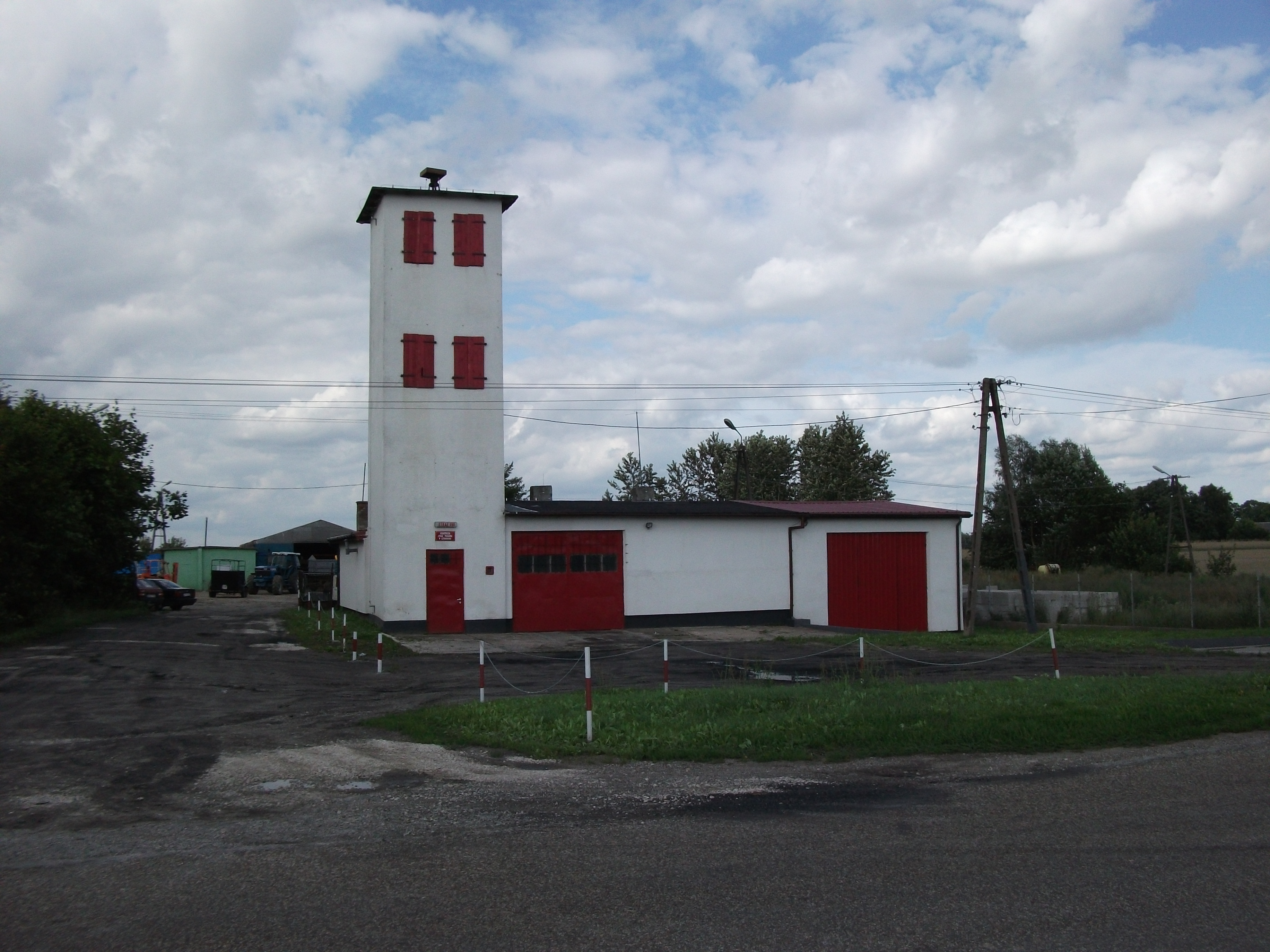 OSP Szembruk